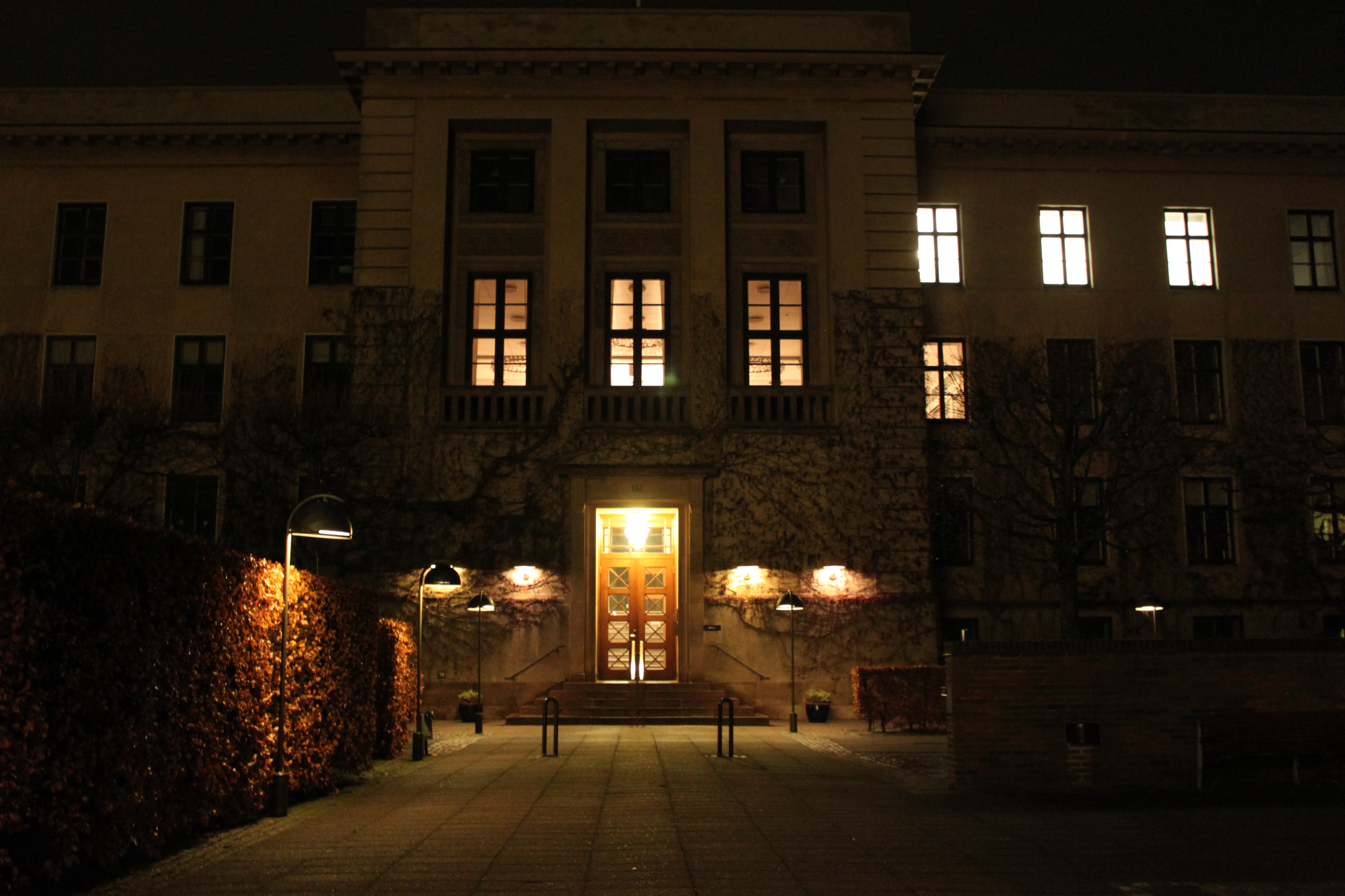 Aftenbillede af indgangspartiet på Gentofte Rådhus, Danmark